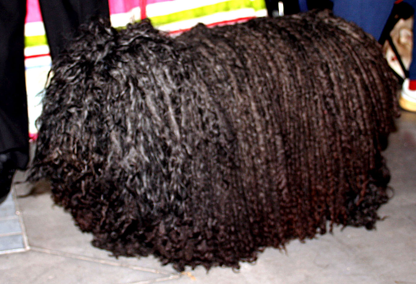 Puli na Światowej Wystawie Psów Rasowych w Poznaniu